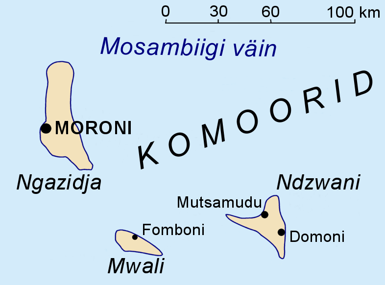 Tehtud selle põhjal